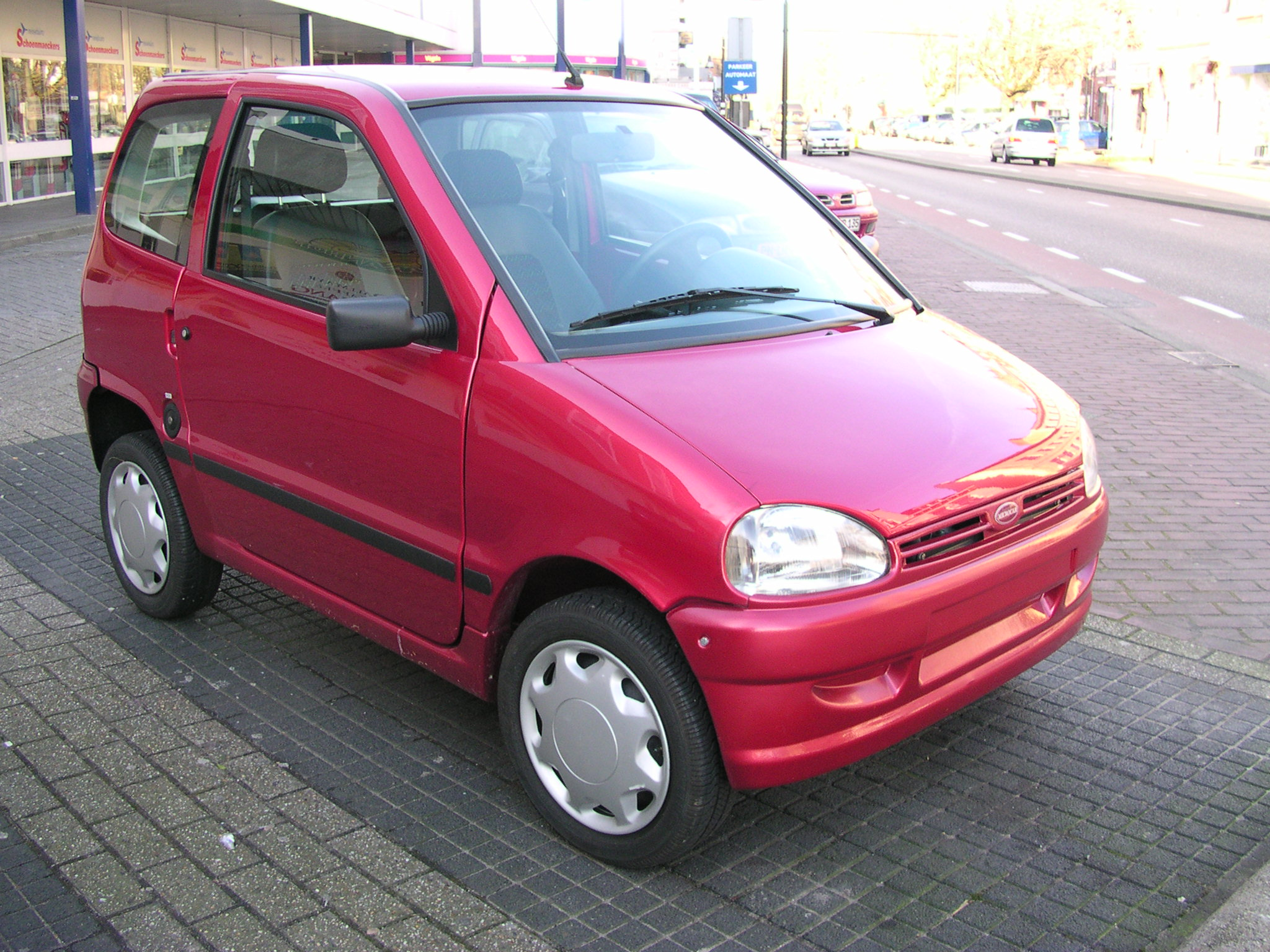 Microcar Virgo Leichtkraftfahrzeug